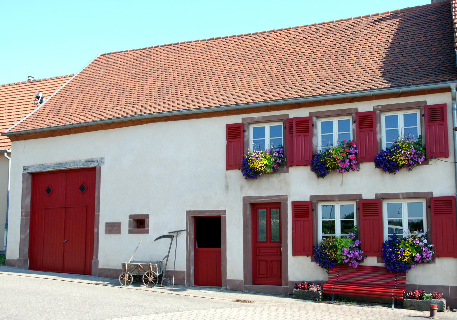 La plus ancienne maison du village construite vers 1790, rachetée par la commune en 2001 et réhabilitée par les Amis de la Maison des Arts et des Traditions